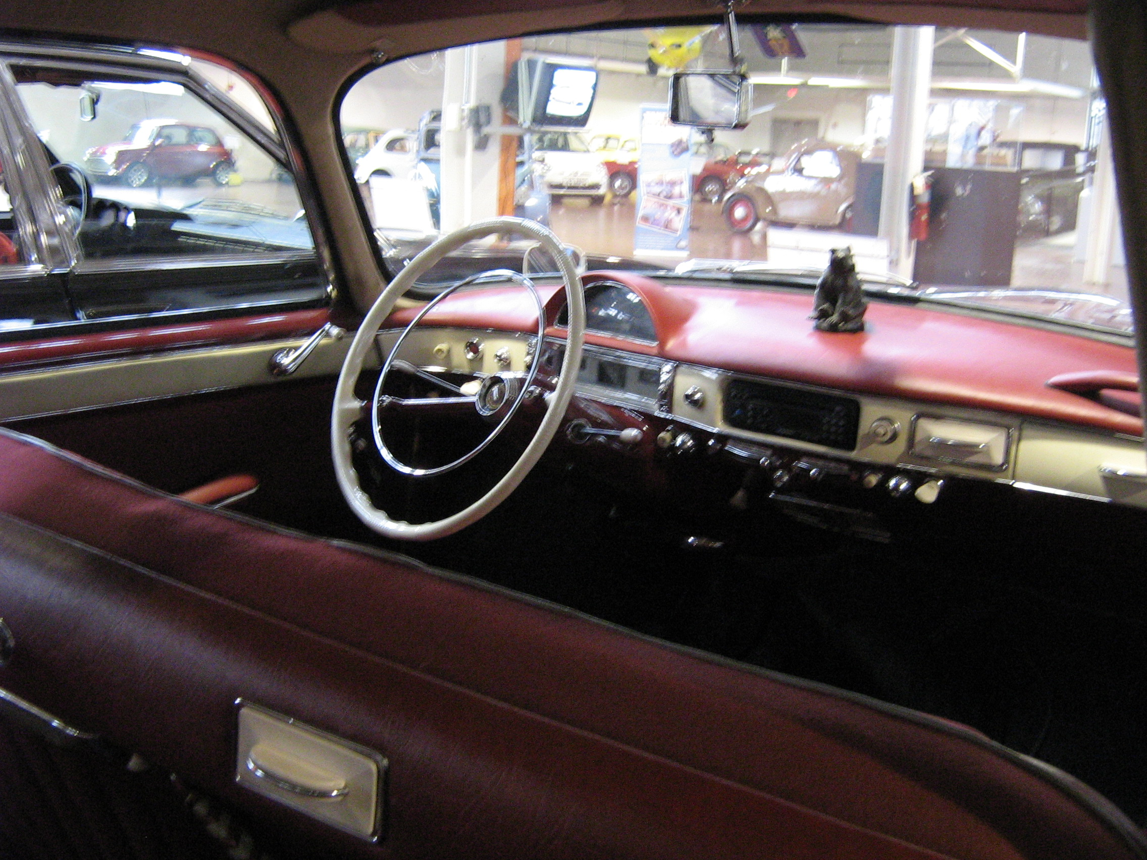 1958 Tatra T-603